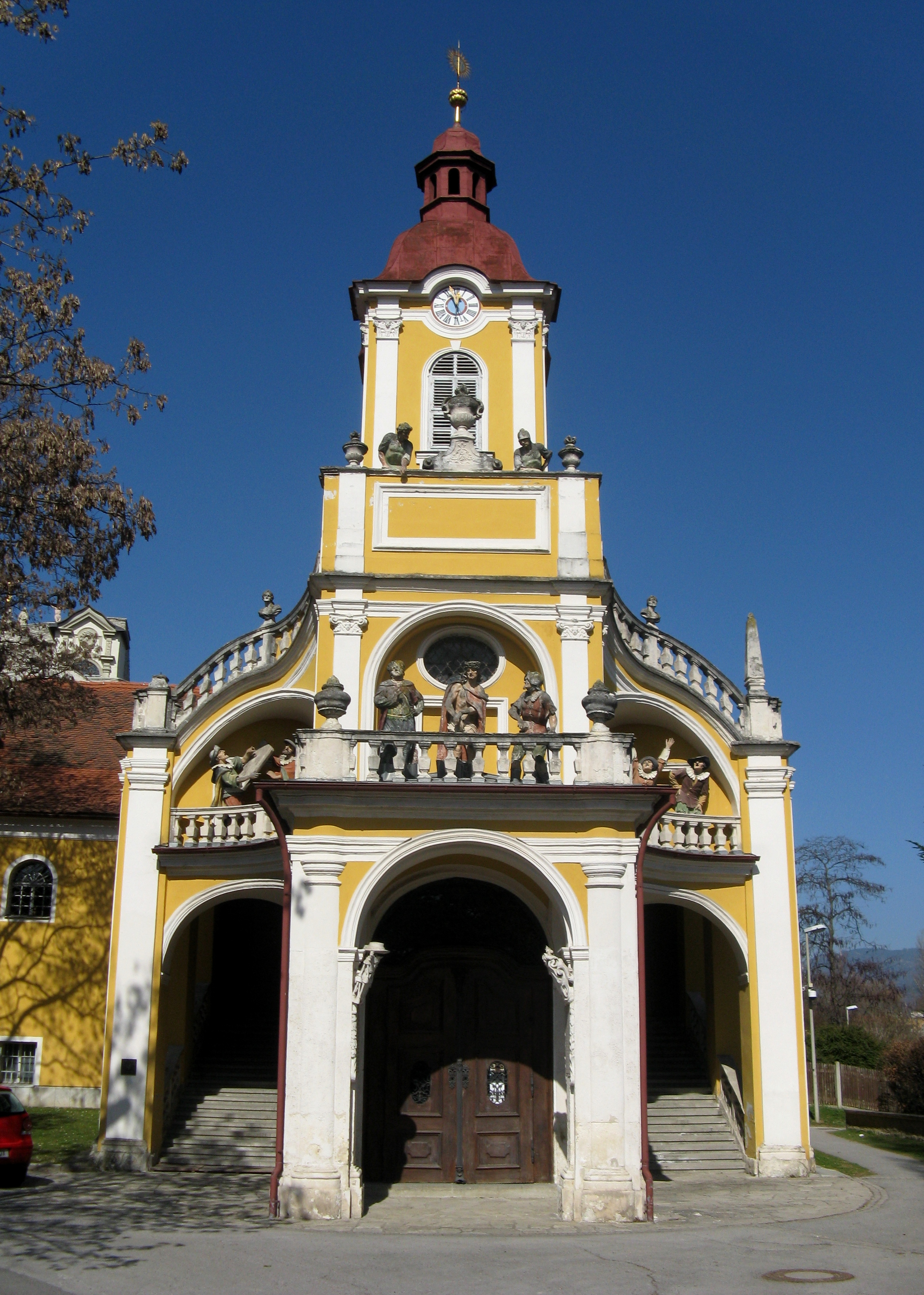 Grazer Kalvarienbergkirche, Frontalansicht